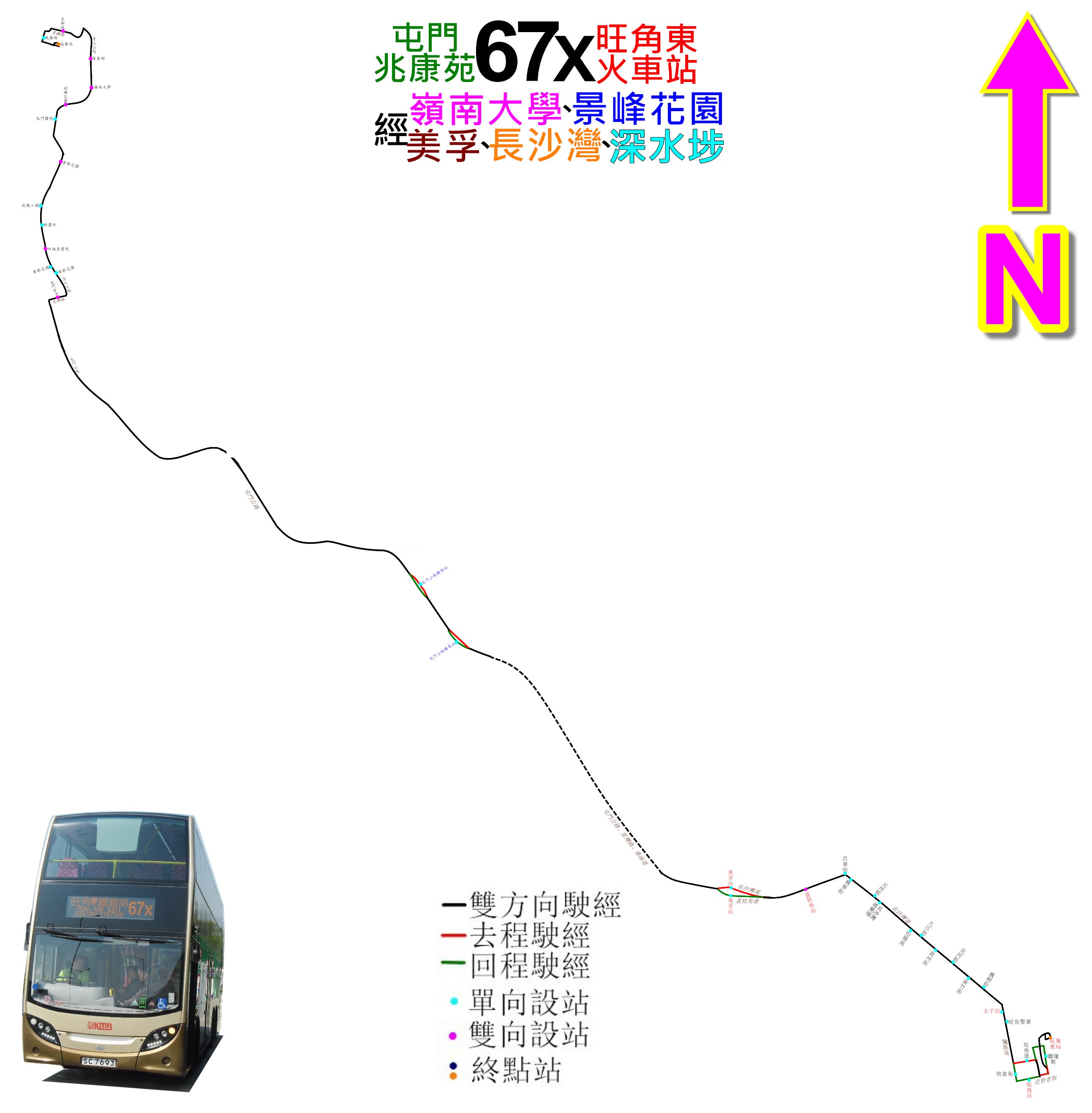 中文（香港）: 九巴67X線的走線圖